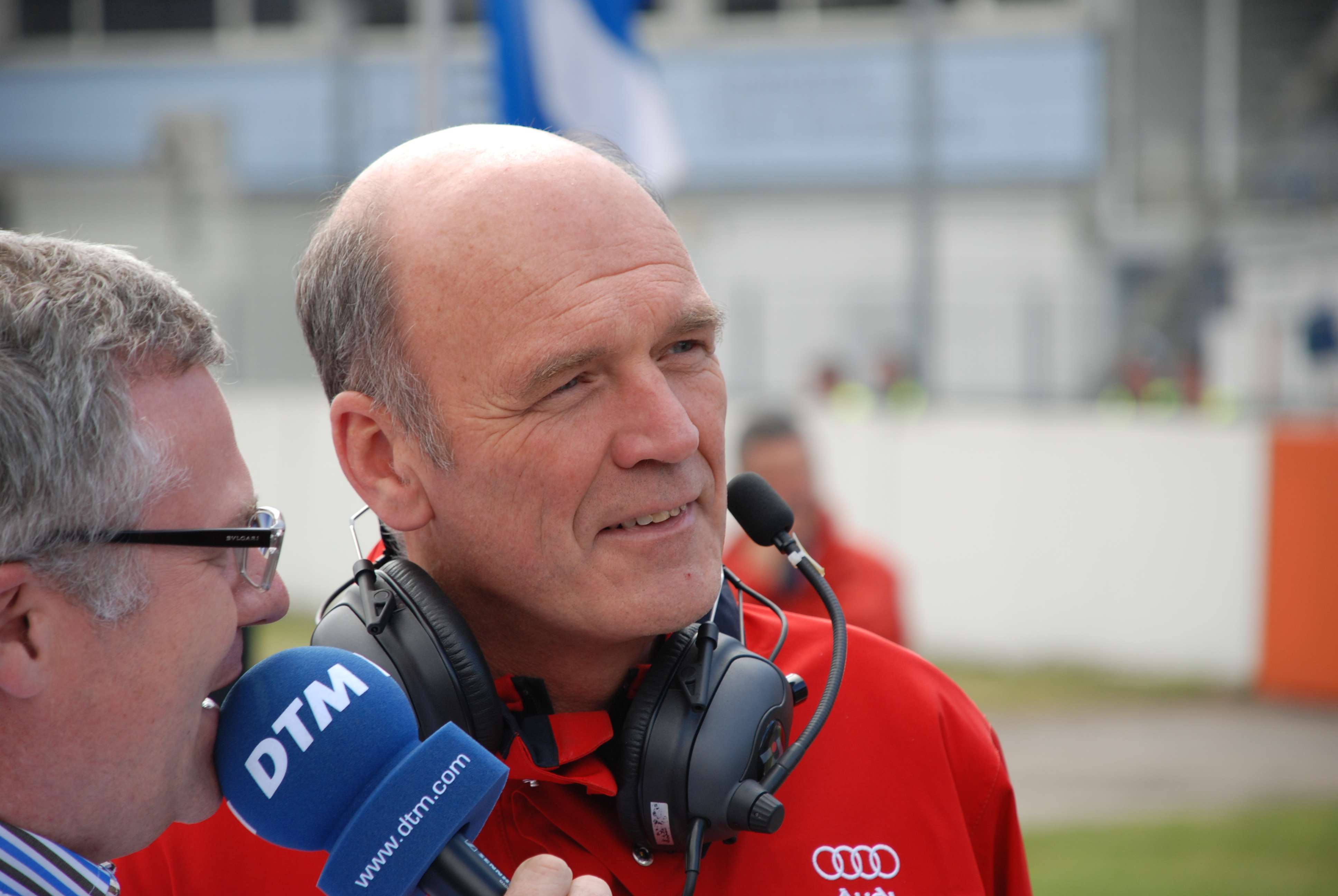 Audi Motorsportchef Dr. Wolfgang Ullrich